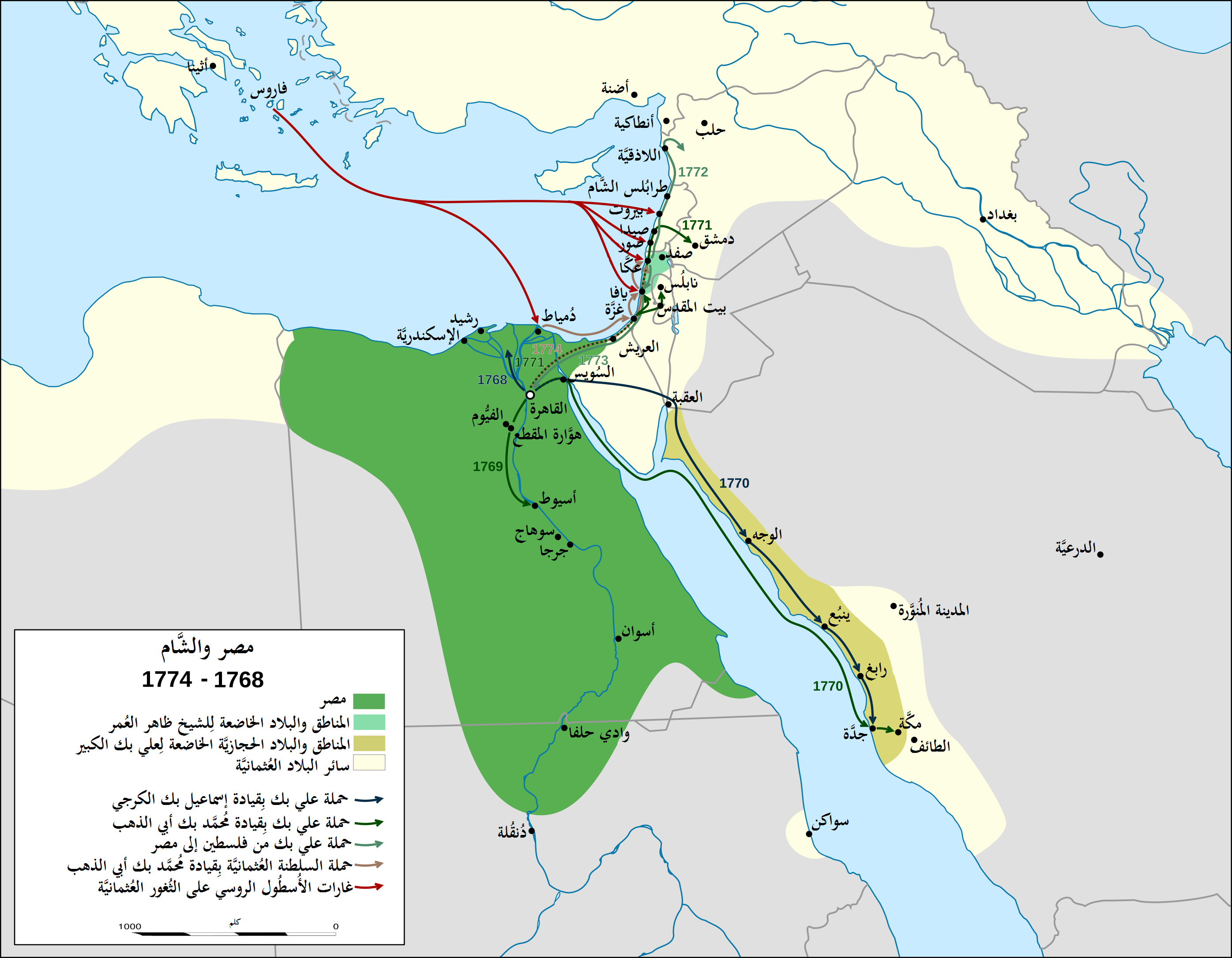 خريطة بلاد مصر والشَّام والحجاز خِلال العصر العُثماني، في الفترة المُمتدَّة بين سنتيّ 1768 و1774م. يظهر فيها مسار العمليَّات العسكريَّة التي وقعت بين علي بك الكبير قائممقام مصر، وظاهر العُمر والي صيدا، والأُسطول الروسي، والسلطنة العُثمانيَّة.